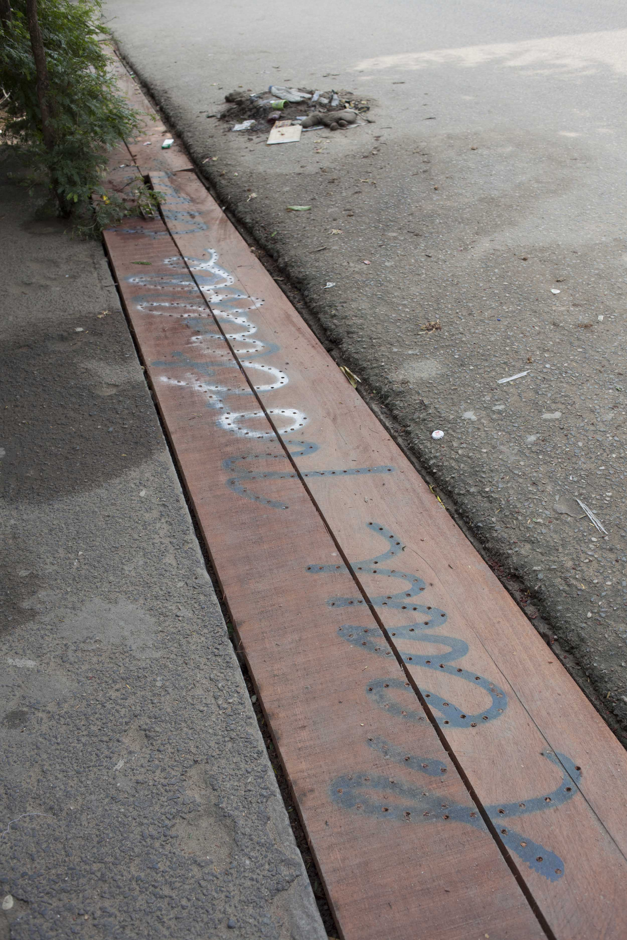 SUD-Salon Urbain de Douala - Kamiel Verschuren